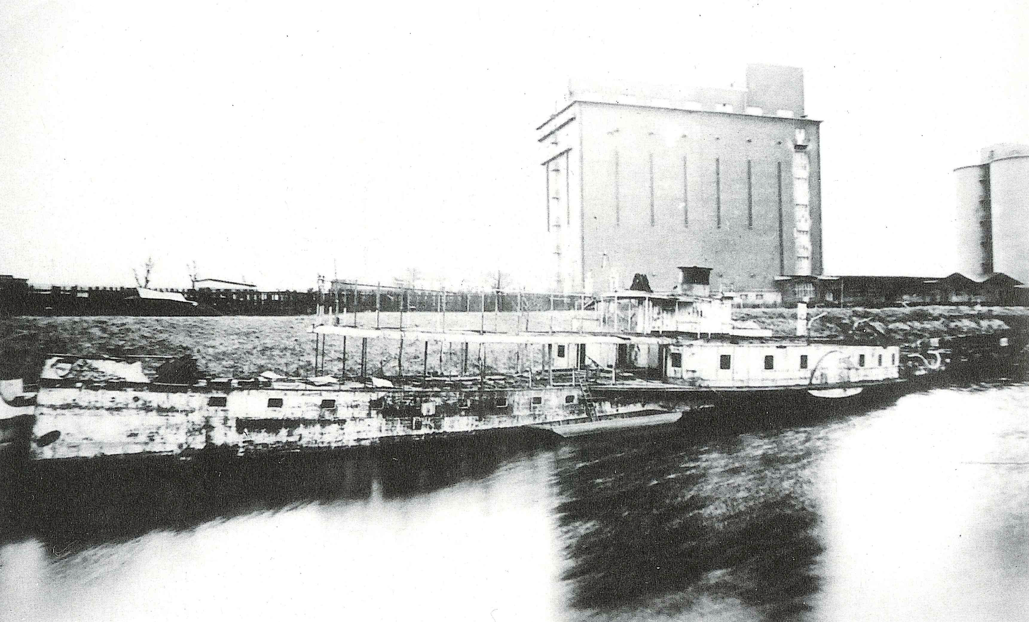 Der Raddampfer Goethe als abgestelltes, kriegszerstörtes Wrack im Düsseldorfer Hafen